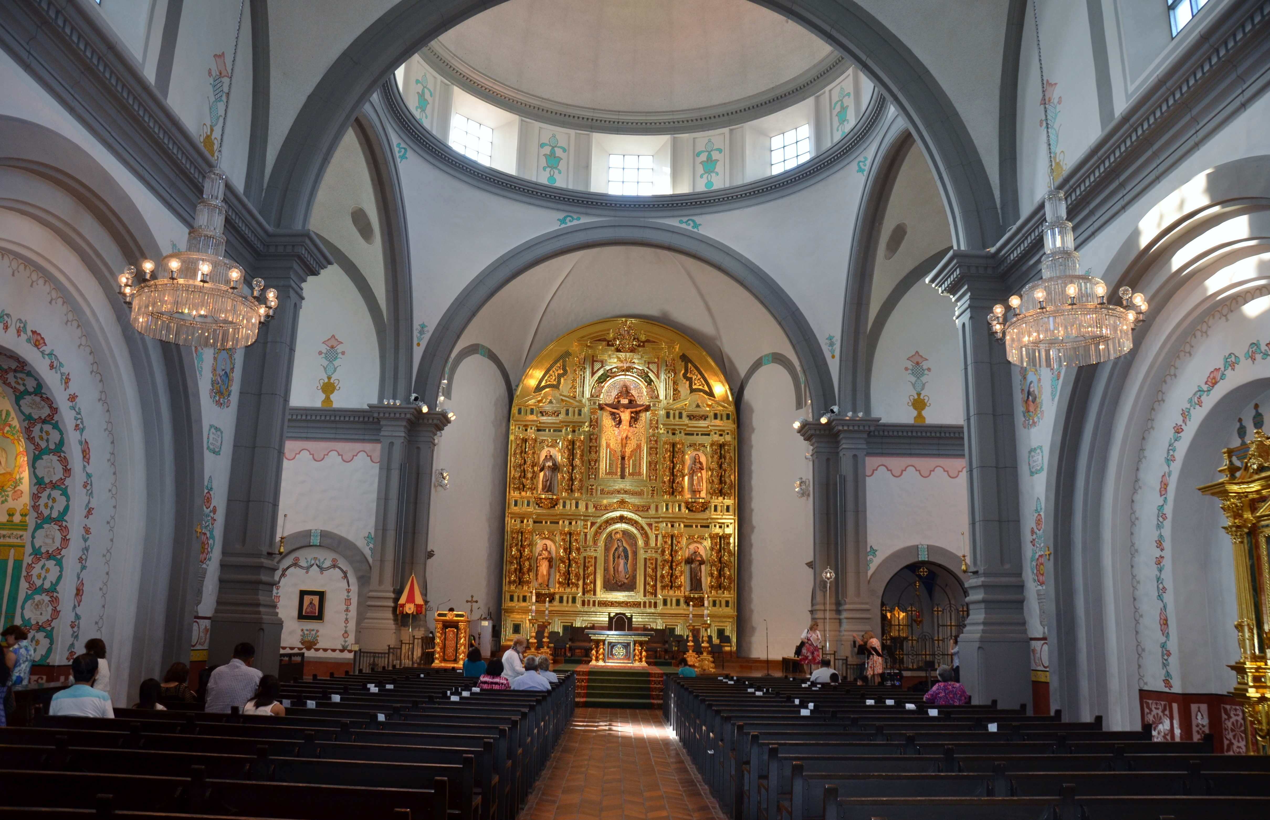 San Juan Capistrano, CA, USA